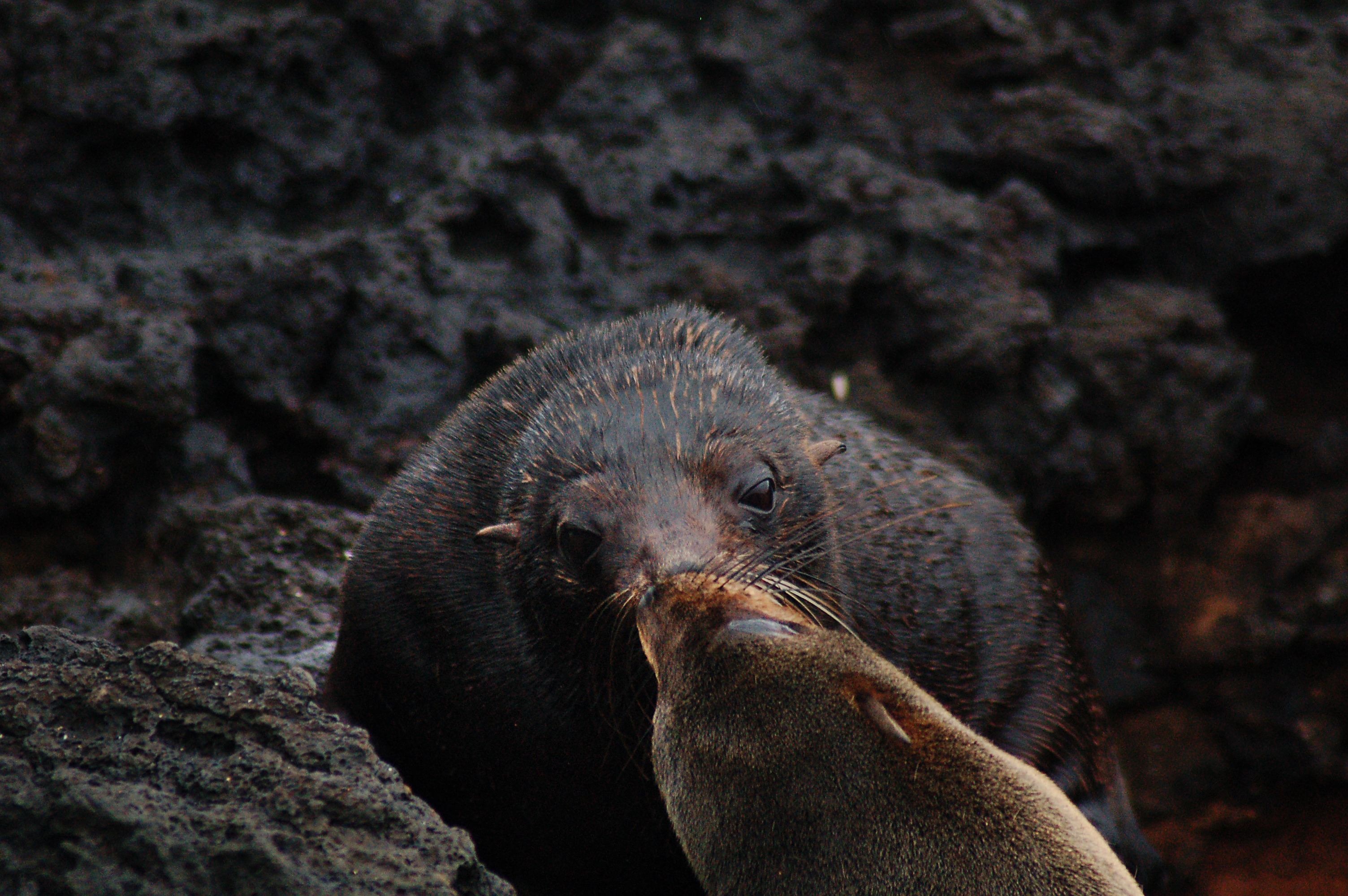 Galápagos fur seals